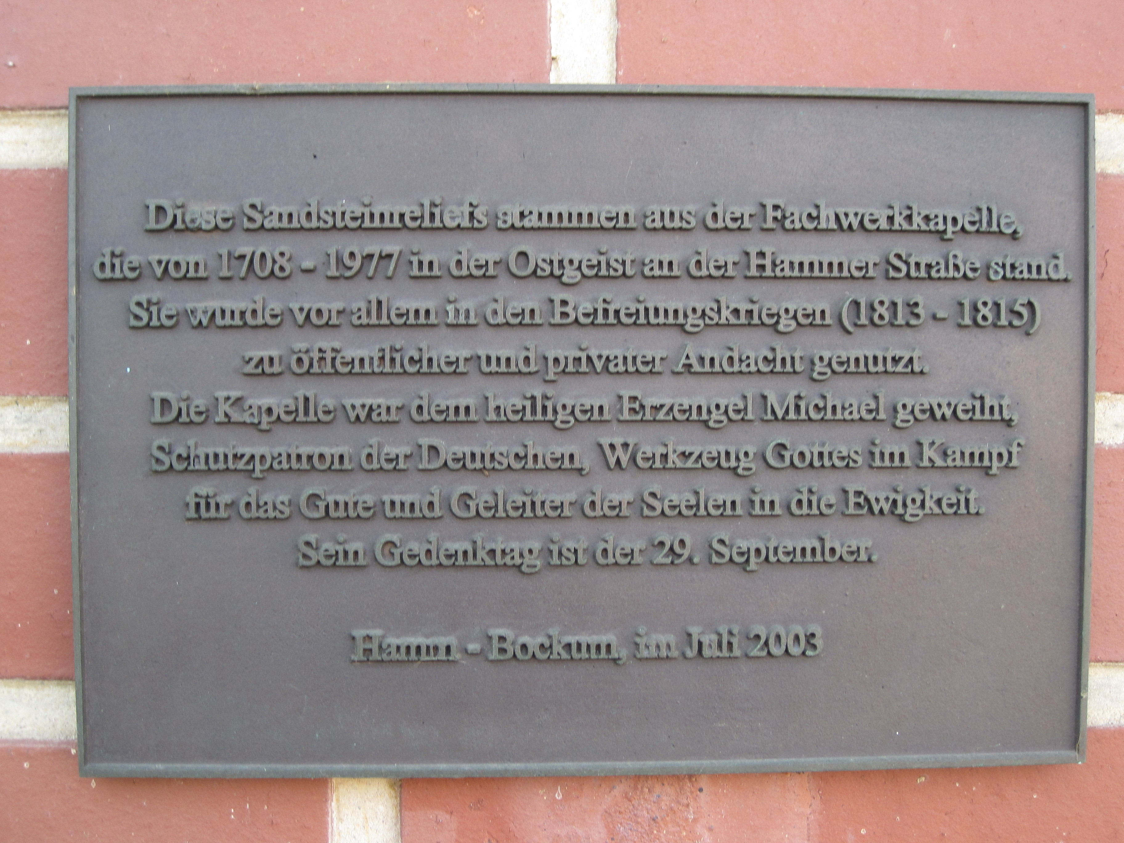 Das Foto zeigt eine Bronze-Tafel, die die St. Michaelskapelle in Bockum beschreibt. Sie hängt am Pfarrheim der St. Stephanus-Kirche Bockum Hövel.